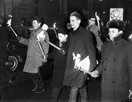 Statsrådet Olof Palme demonstrerar sida vid sida med den nordvietnamesiske Moskvaambassadören Nguyen Tho Chyyan i Stockholms februarikyla. De protesterar mot USA:s krigföring i Vietnam. Fackeltåget väckte stor vrede i USA.